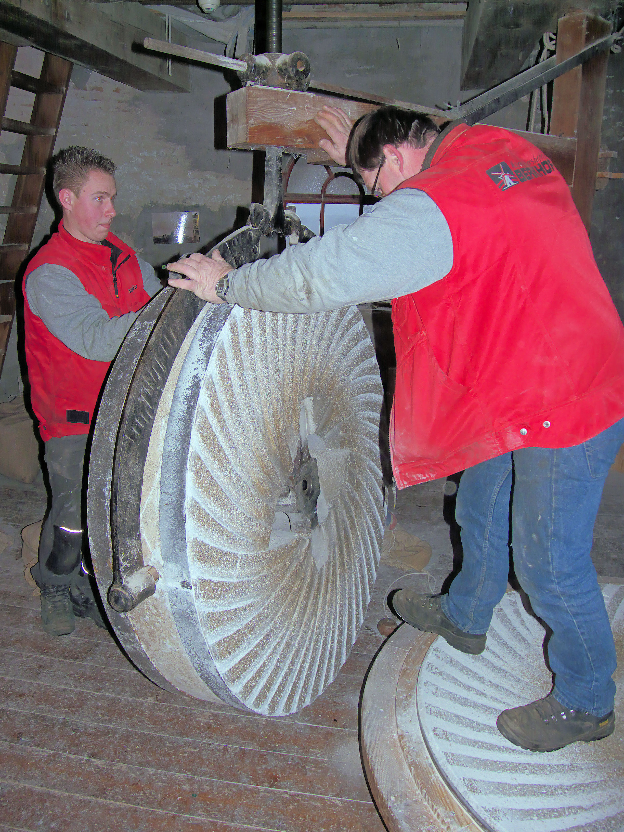 Molen De Hoop, Garderen, openleggen maalkoppel